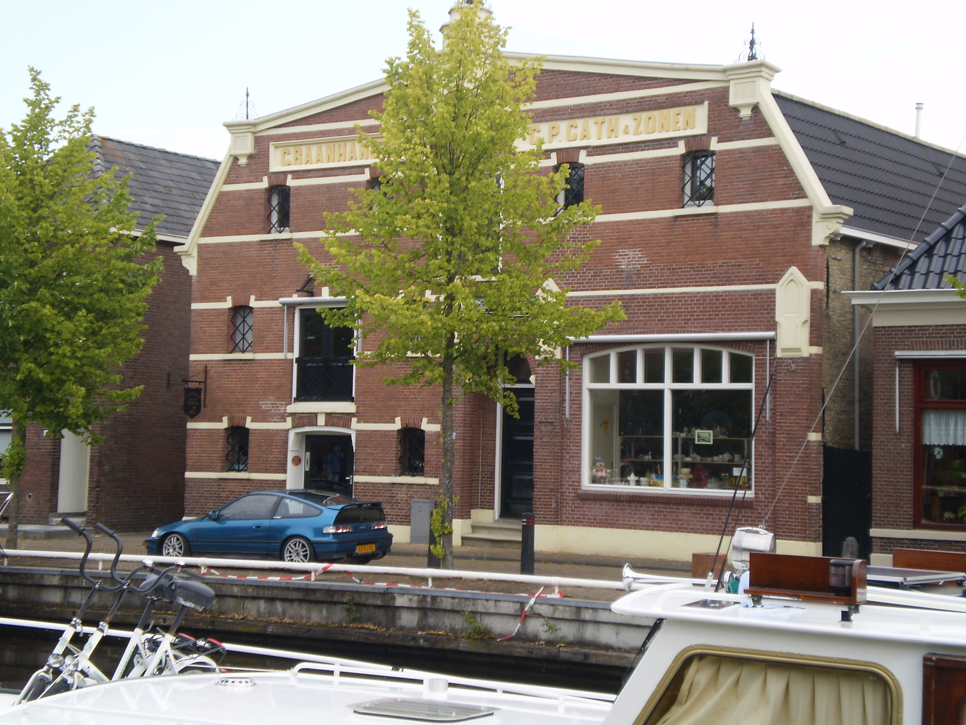 Ofbyld oanbean troch Swarte Kees op 30 july 2009